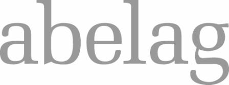 Logo der Abelag Aviation